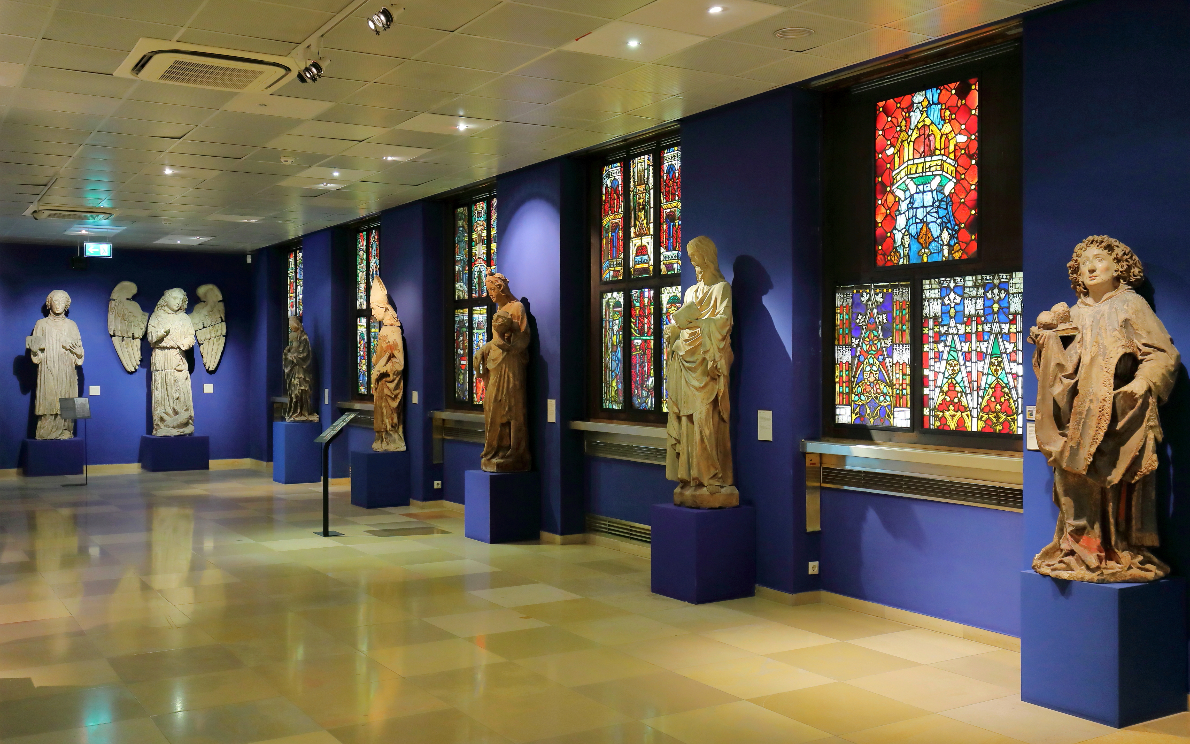 Schauraum mit Exponaten aus dem Stephandom im Museum Karlsplatz im 4. Wiener Gemeindebezirk Wieden an der Adresse Karlsplatz 8. Präsentiert werden in diesem Raum Bildfenstern aus dem 14. Jahrhundert und originale Steinskulpturen aus dem 15. Jahrhundert, die am Stephansdom durch Kopien ersetzt wurden.